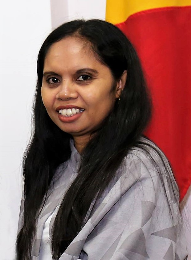 Maria Angelina Lopes Sarmento